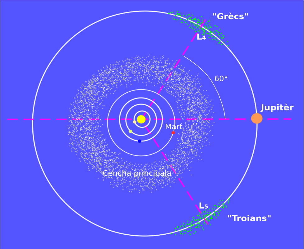 Esquèma generau dau Sistèma Solar mostrant la cencha principala e leis asteroïdes troians de Jupitèr.